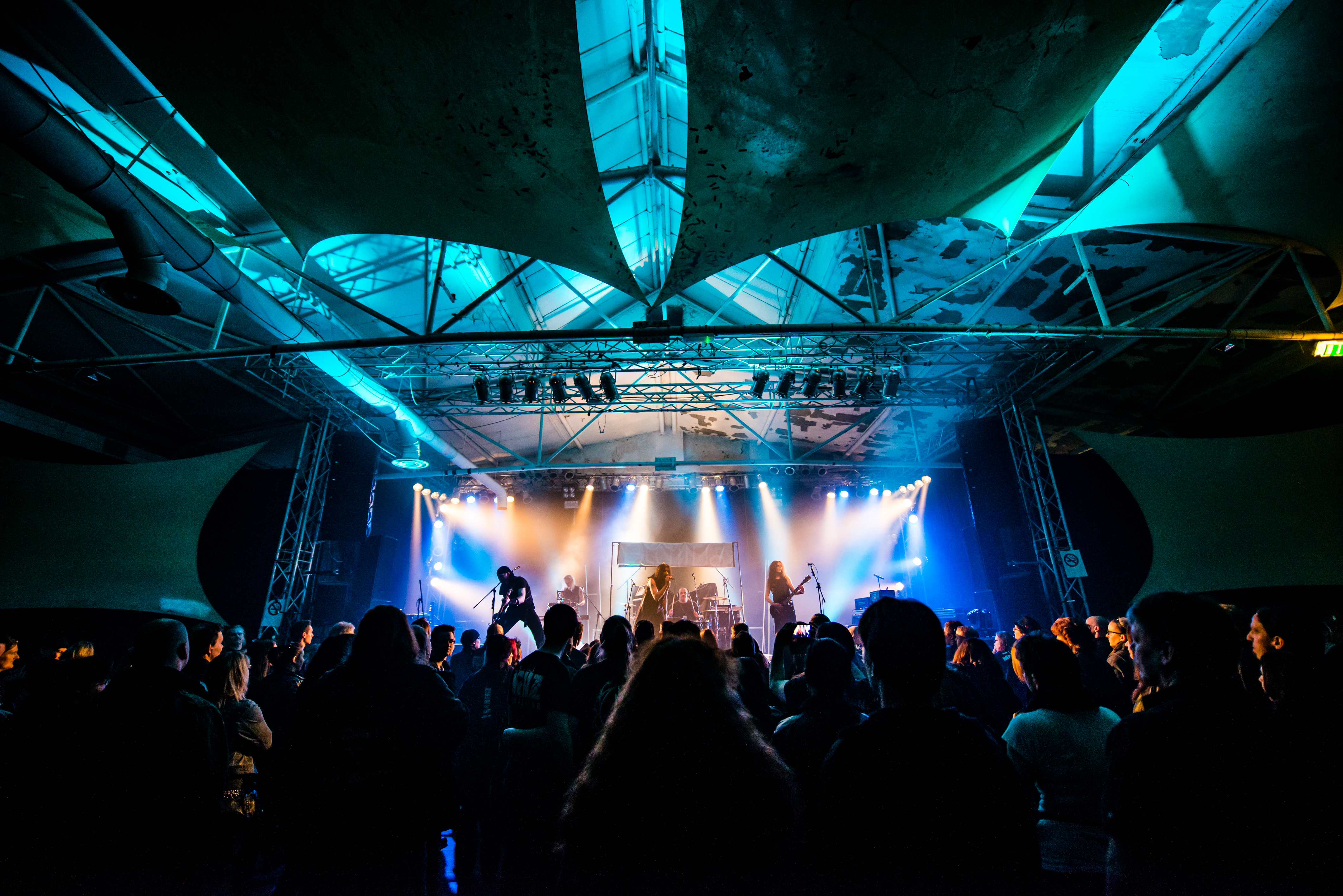 'Hell-O-Matic Support für Megaherz Erdwärts Tour - Köln Essigfabrik'